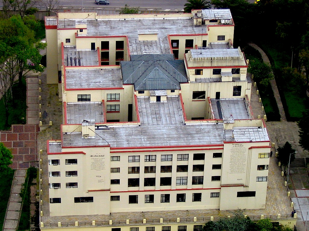 Biblioteca Nacional - Vista Panorámica desde la Torre Colpatria Bogotá D.C.